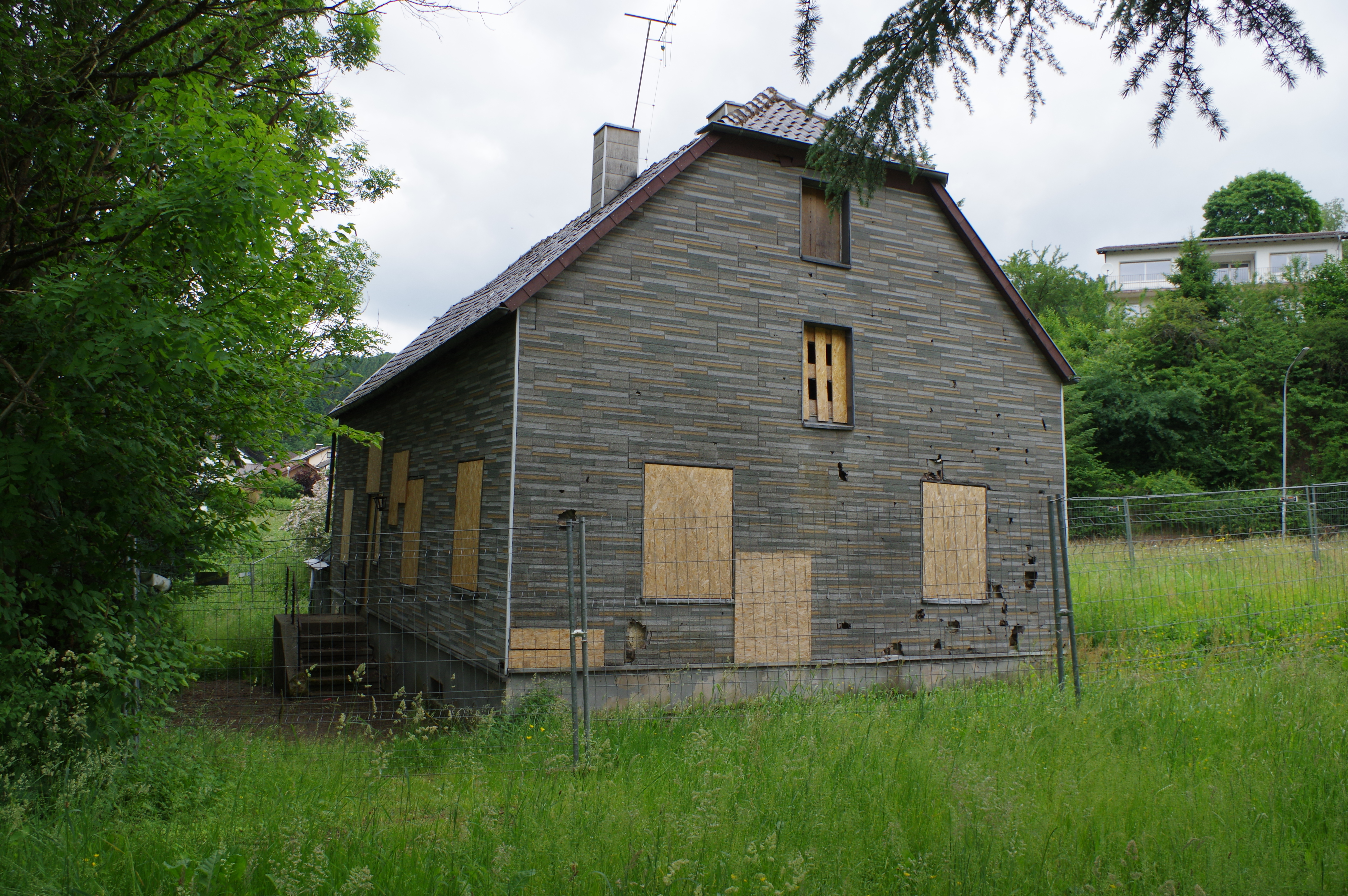 Hellenthal, Hardtstr. 2, Südostseite